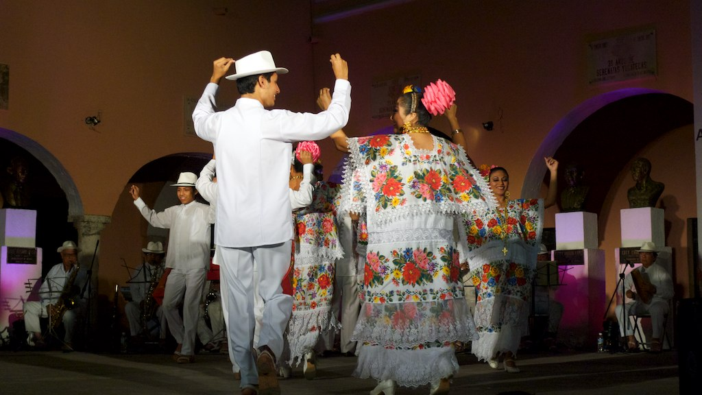 Baile jaranero en la plaza de SantaLucia en Mérida, Yucatan, México